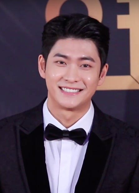 191231 KBS연기대상 강태오.